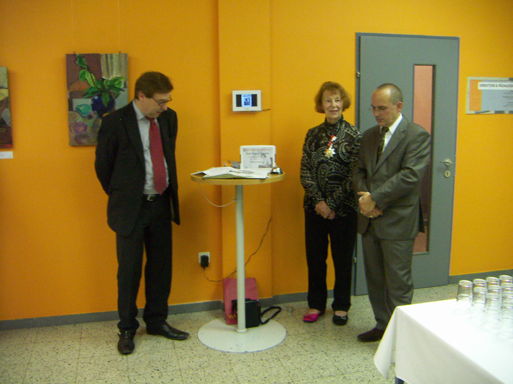 Kurt Stürzenbecher, Ruth Rogers-Altmann, Robert Streibel bei der Eröffnung ihrer Ausstellung Ruth Rogers-Altmann Retrospektive 2008 in der Volkshochschule Hietzing